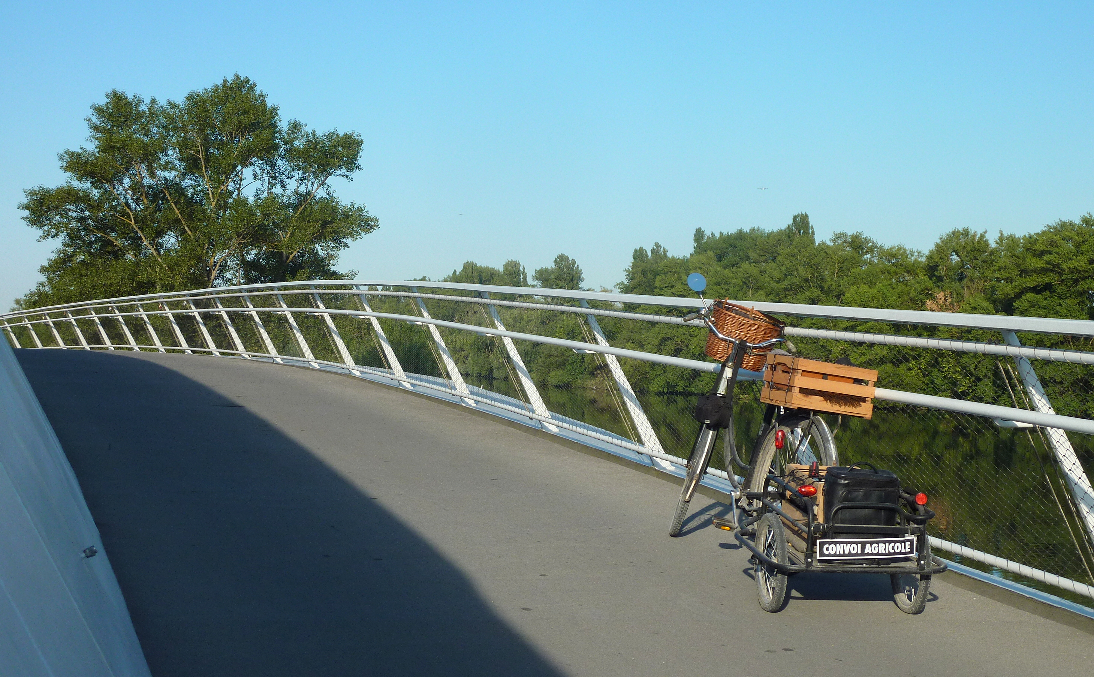 Die Ölhafenbrücke Raunheim ist eine im Jahr 2014 eröffnete, 170 Meter lange Fahrrad- und Fußgängerbrücke am Ufer des Mains in Hessen. Die Brücke steht auf der Gemarkung der zum südmainischen Kreis Groß-Gerau gehörenden Gemeinde Raunheim, die zugleich Bauherrin der Brücke ist. Das vom Frankfurter Architekturbüro Schneider + Schumacher entworfene Bauwerk führt über eine spiralförmig angelegte Rampe über den am linken Mainufer liegenden Raunheimer Ölhafen. Der Hafen mit angeschlossenem Tanklager ist ein Umschlagplatz der regionalen Binnenschifffahrt für Treibstoffe zur Versorgung des benachbarten Frankfurter Flughafens. Im Bild die Fahrbahn der Brücke, Blick nach Westen